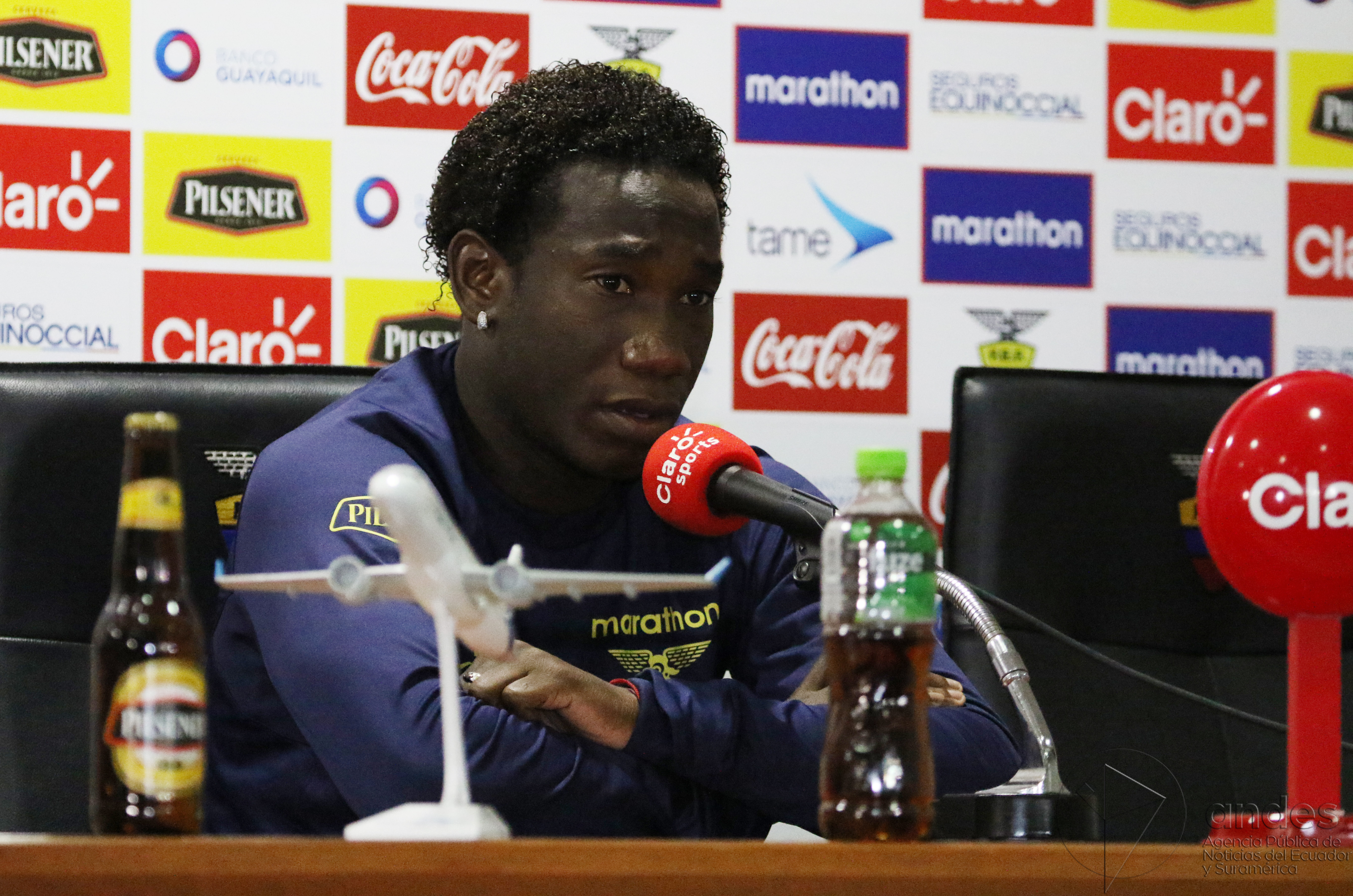 Quito, 24 de marzo de 2017 (Andes).- Luis Caicedo seleccionado de la Tricolor hace un análisis de lo que será el partido frente a Colombia el próximo martes 28 de marzo en el estadio Olímpico Atahualpa. ANDES/Micaela Ayala V.